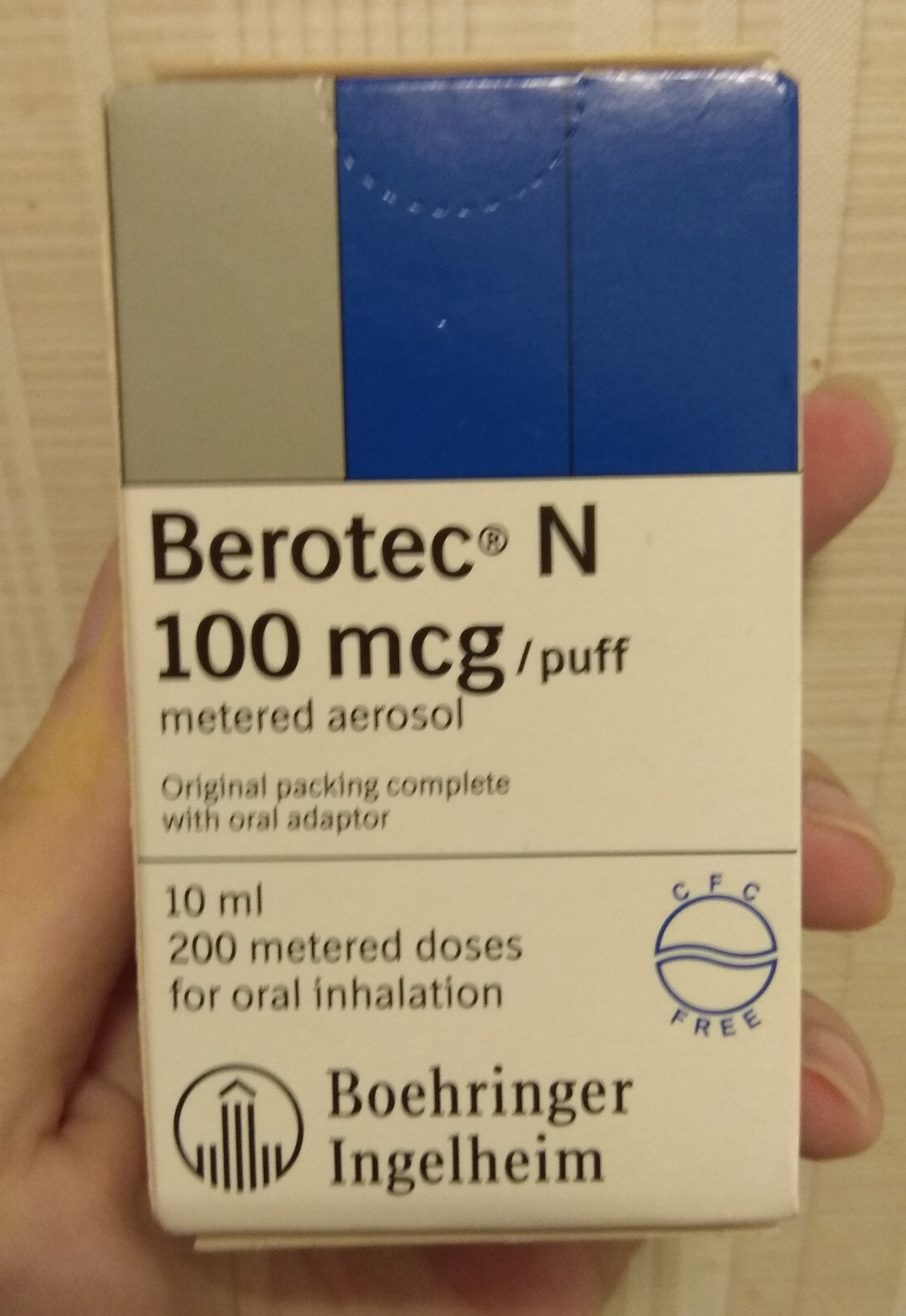 Asthma inhaler